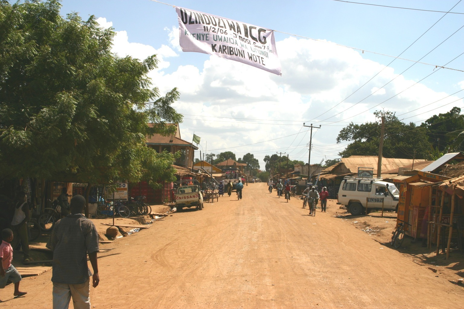 Ifakara mainroad